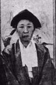 李氏朝鲜的三品堂下官夫人